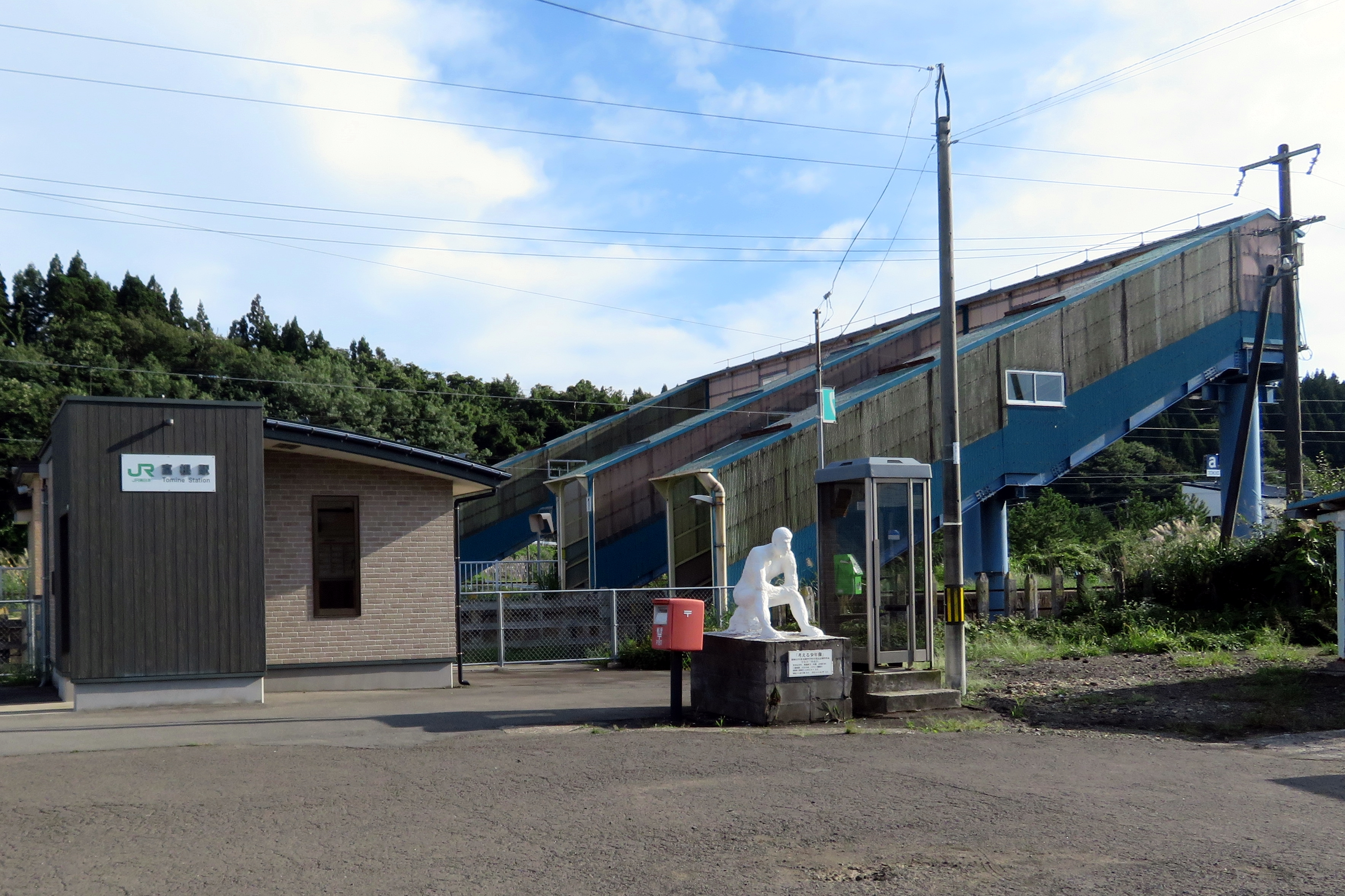 JR奥羽本線富根駅 ：秋田県能代市二ツ井町飛根